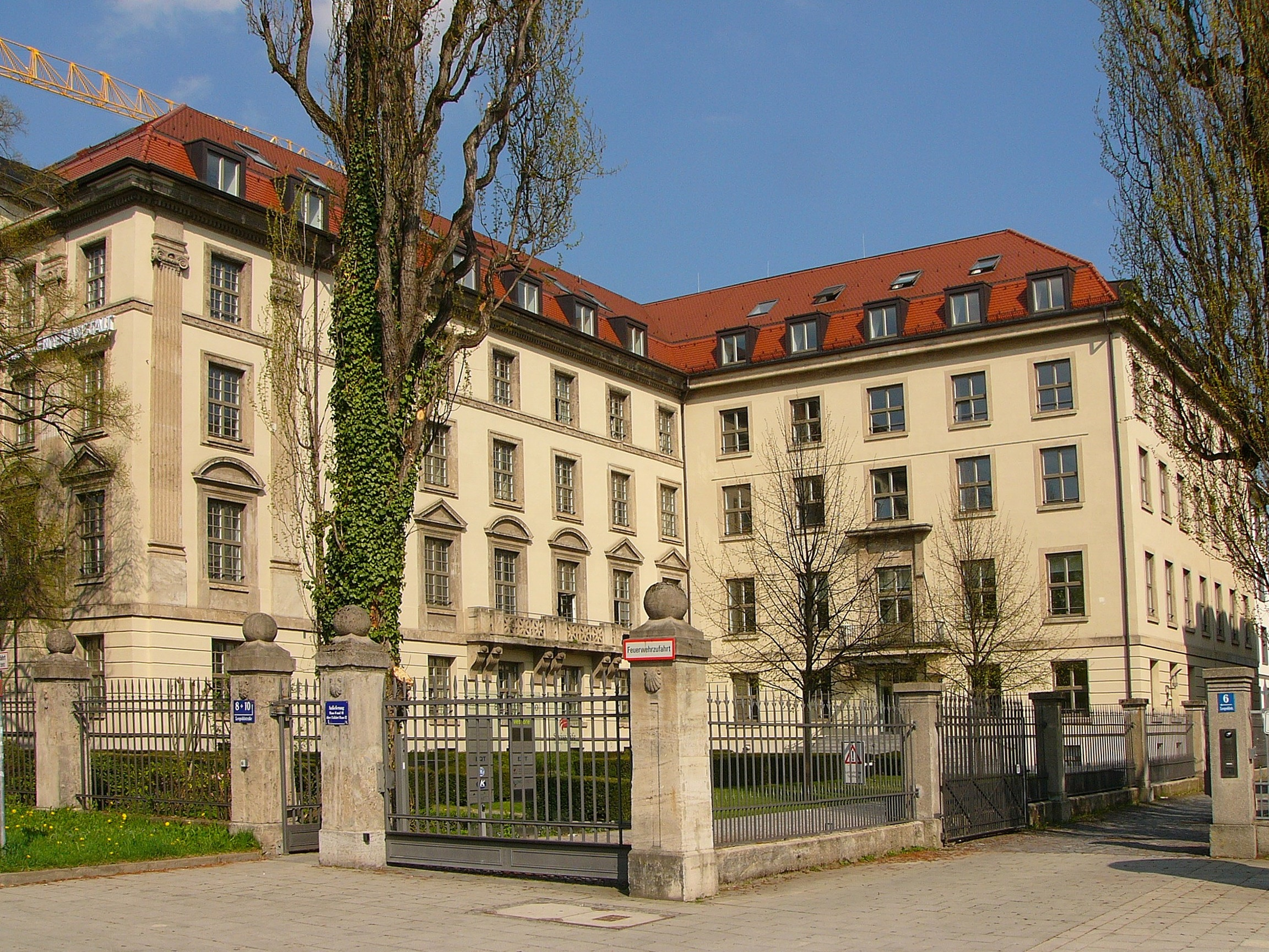 Schweizerische Lebensversicherungs- und Rentenanstalt; neuklassizistisch, um 1909–11 von Friedrich Thiersch; Nr. 8 bildet mit Nr. 10 einen hakenförmigen Komplex; Nr. 10 mit Kolossalpilastern und mit plastischem Dekor an den Zaunpfeilern, Fassadenpreisträger 2005.This is a photograph of an architectural monument.